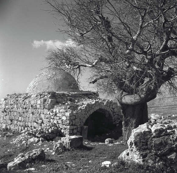 בית אל - מראה